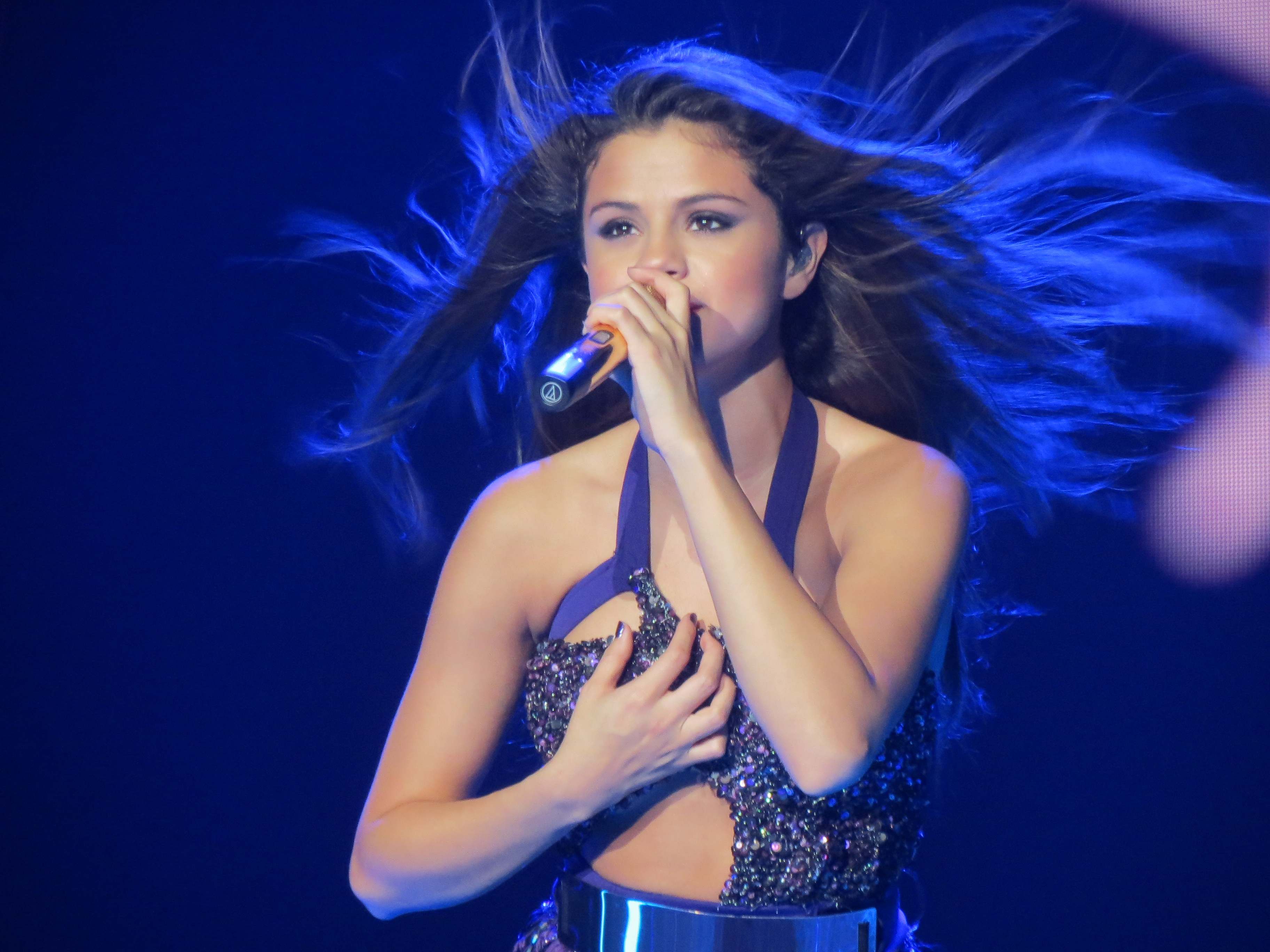 Selena Gomez StarsDance Nov 2013 San Diego, CA